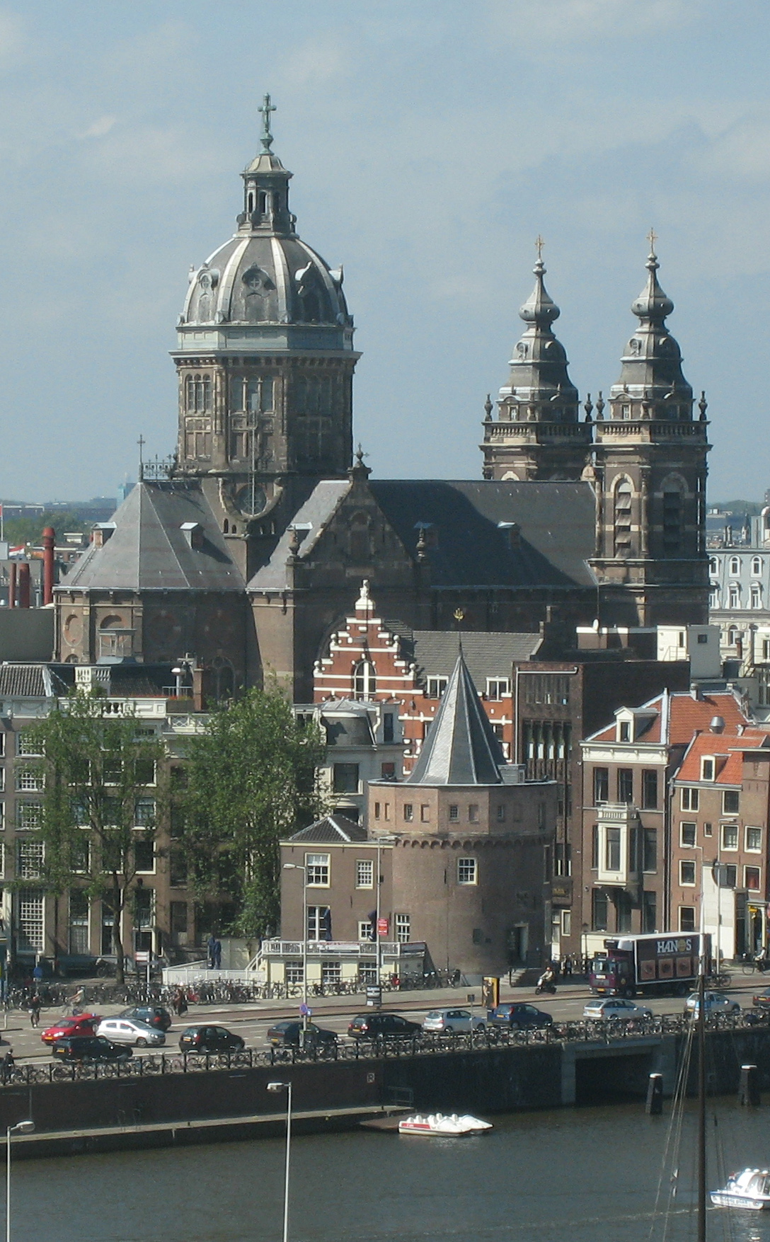 Sint Nicolaaskerk (Sint Nicolaas church) in Amsterdam. Also visible is the Schreierstoren.